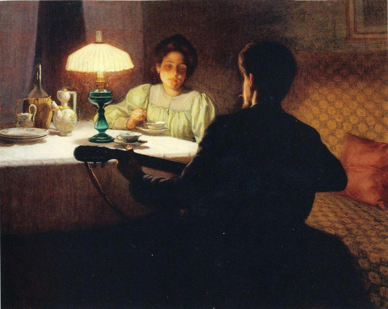 Elin Danielson-Gambogin maalaus Iltahetki, esittää taiteilijan puolisoa Raffaello Gambogia soittamassa kitaraa tuntemattomalle nuorelle naiselle. Maalaus kuuluu yksityiskokoelmaan.